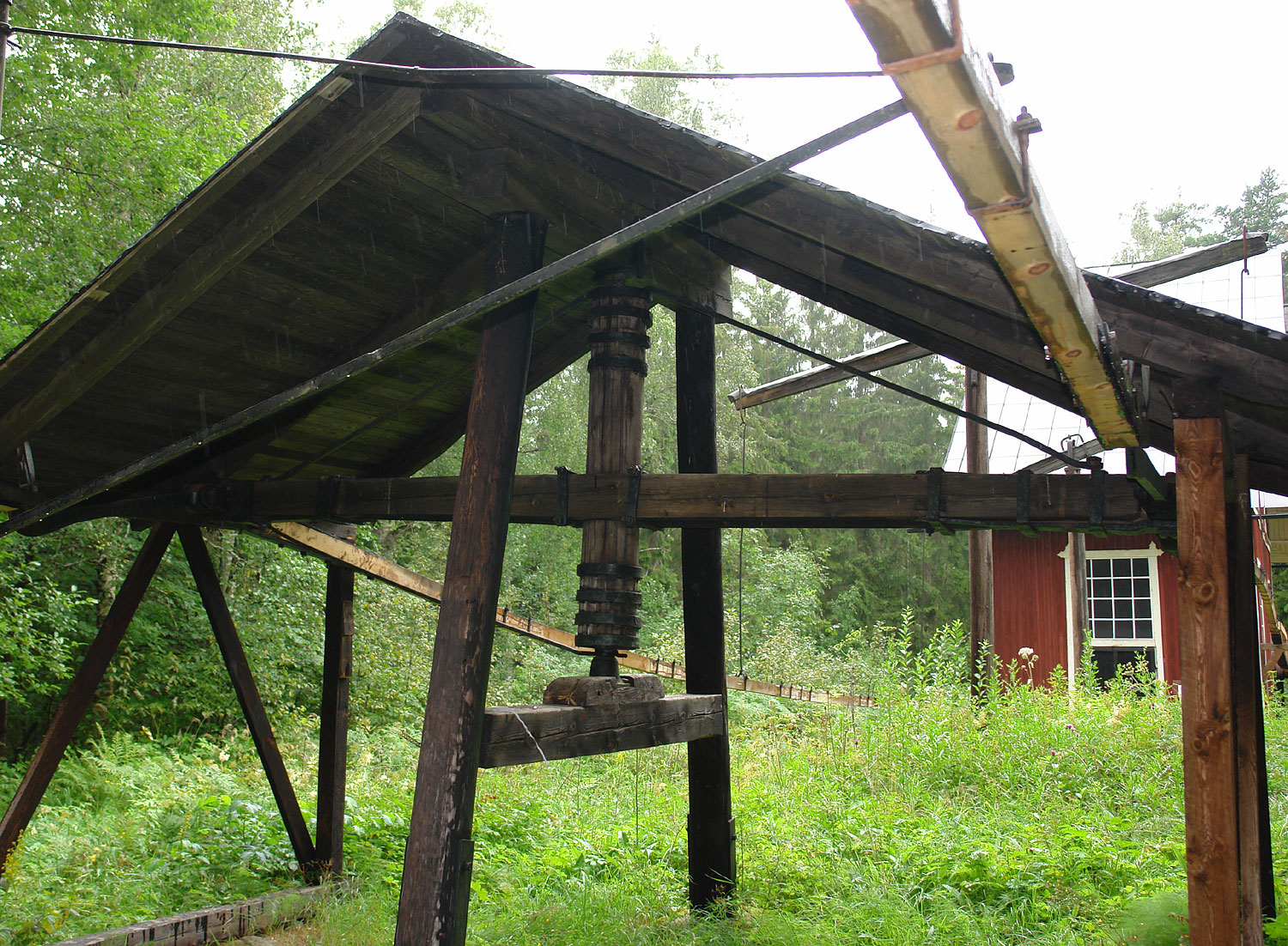 Das Polhemsrad (Polhemshjulet) ist ein Wasserrad, das in der schwedischen Bergwerksregion Bergslagen (nahe Norberg) von 1876 bis 1920 Teil eines Antriebsystems zur Entwässerung von Erzgruben war. Foto: Zwischenlager